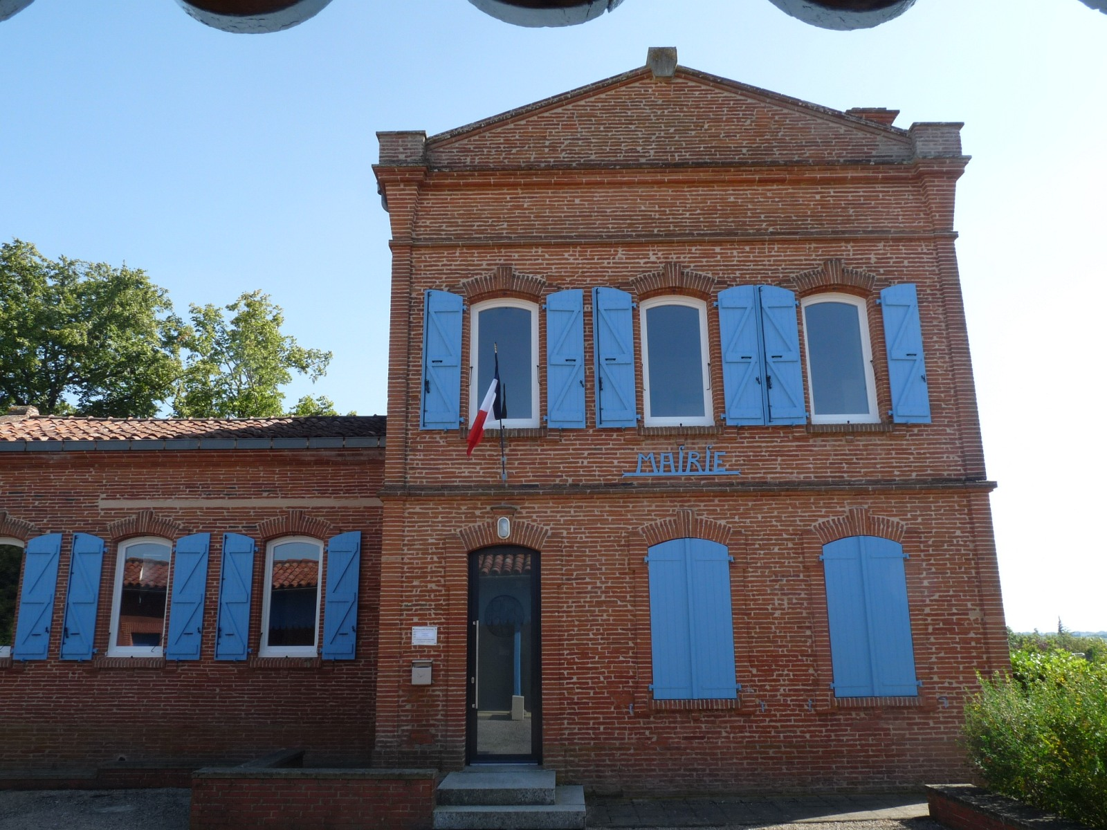 Mairie d'Aurin, Haute-Garonne, France